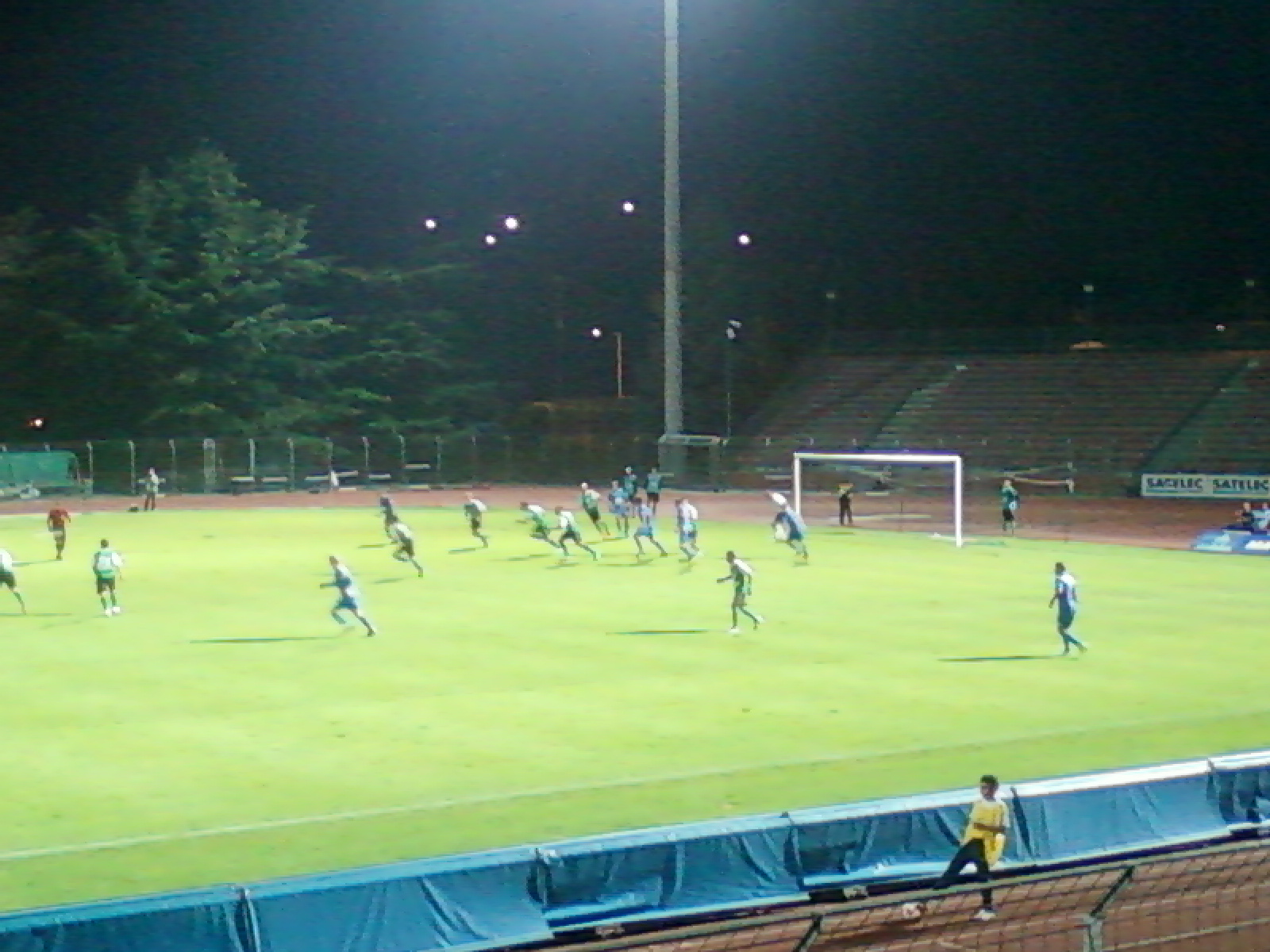 US Créteil - Colmar National (2)